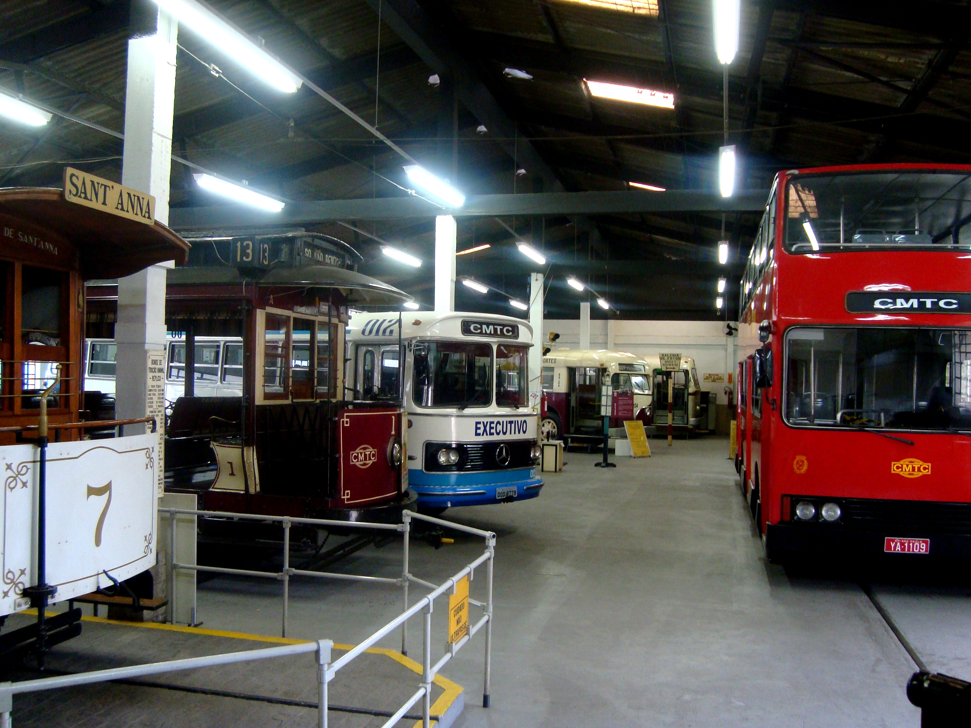 Foto do interior do Museu do Transporte Público Gaetano Ferolla no bairro do canindé, são paulo/SP